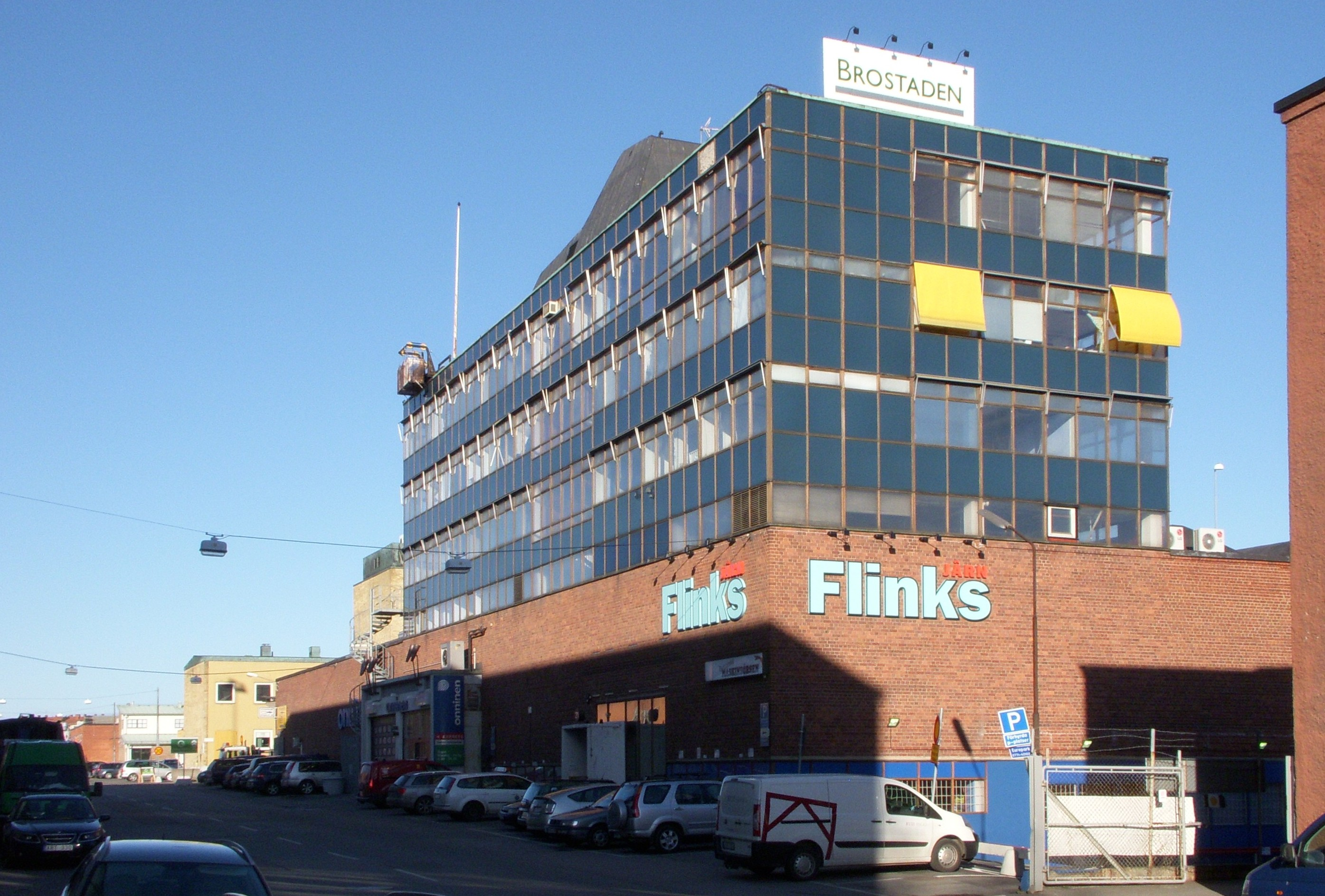 Hallvägen 21 i Slakthusområdet, Johanneshov, Stockholm; "Möller & Co"